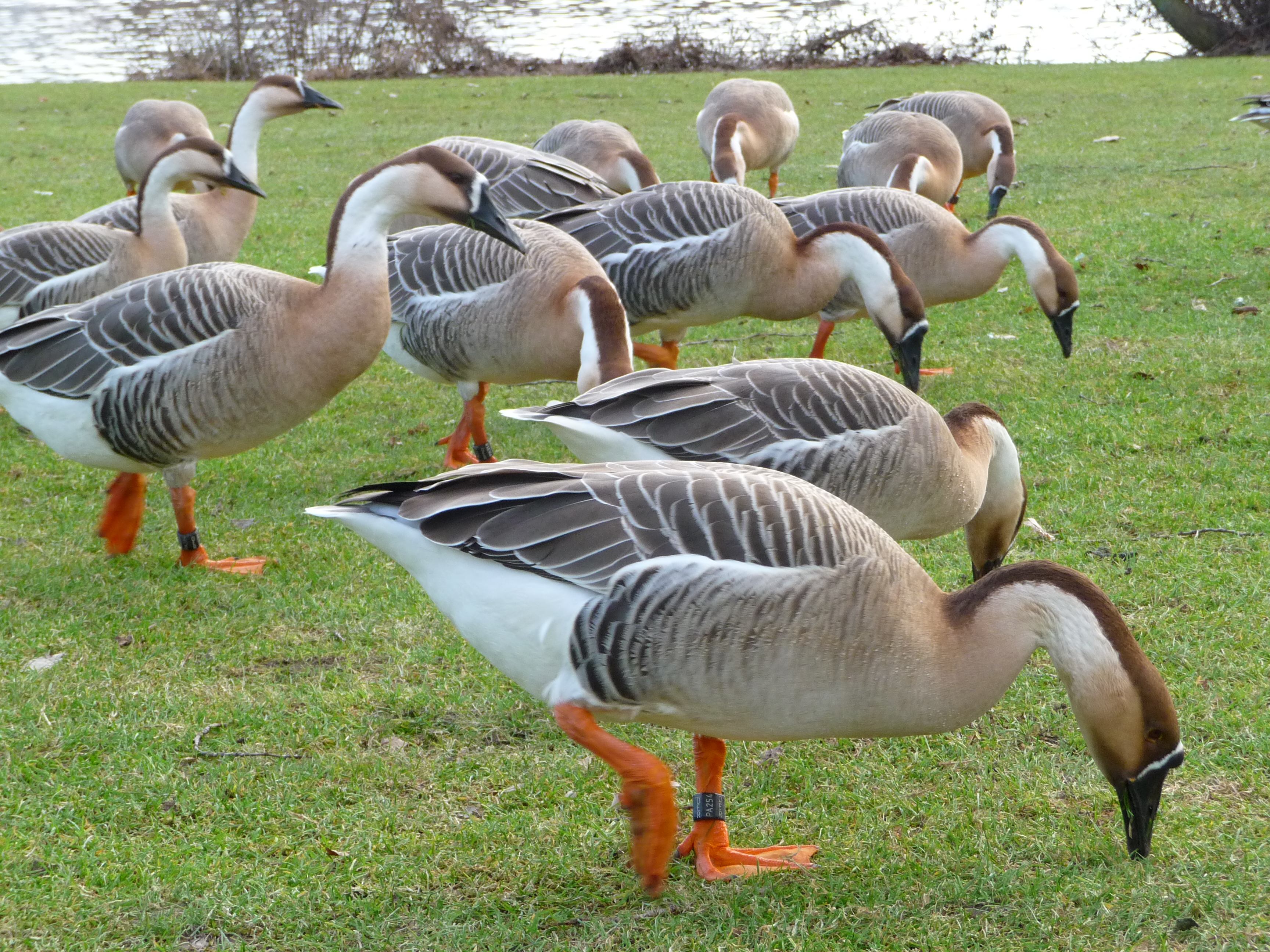 Schwanengänse (Anser cygnoides) am nördlichen Ufer des Neckars in Heidelberg (Baden-Württemberg, Deutschland)